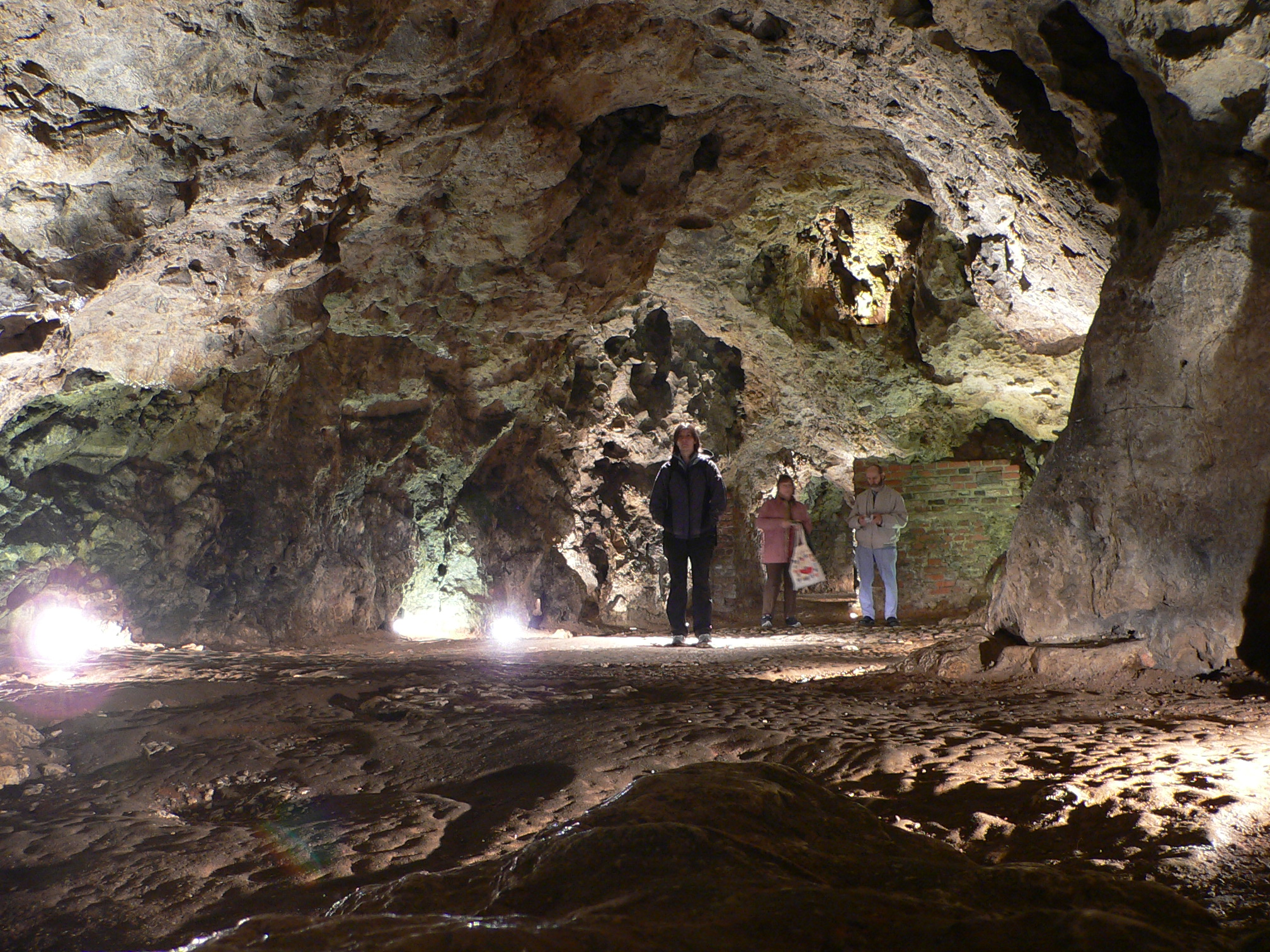 Kraków - Wawel - Smocza Jama - inside